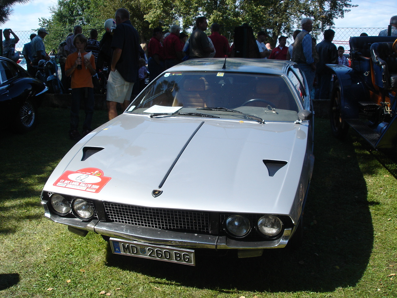 Front eines silbernen Lamborghini Espadas